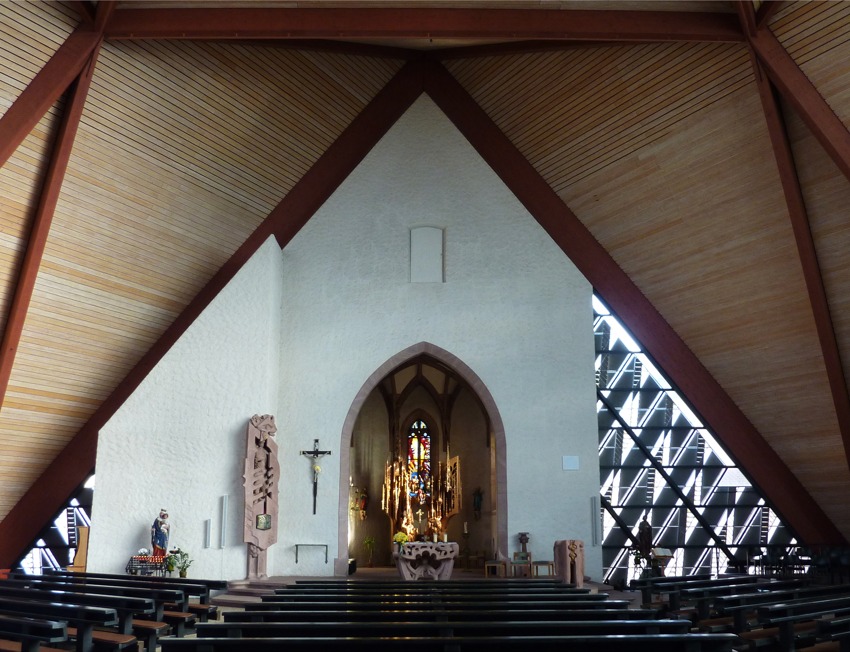 Kirche St. Georg in Bleibach: Innenraum mit Blick zum gotischen Chor.